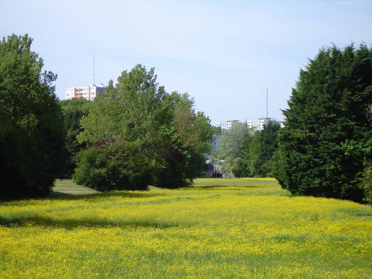 Situé en bordure du quartier des Couronneries, à Poitiers